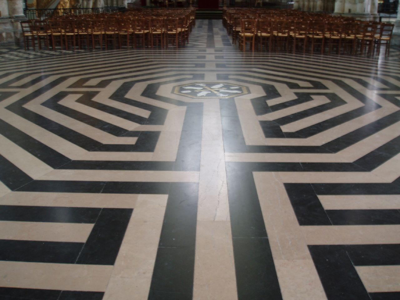 Amiens (Somme, France)